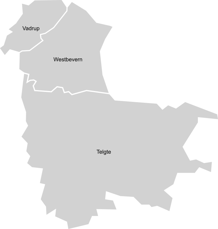 Ortsteilkarte von Telgte